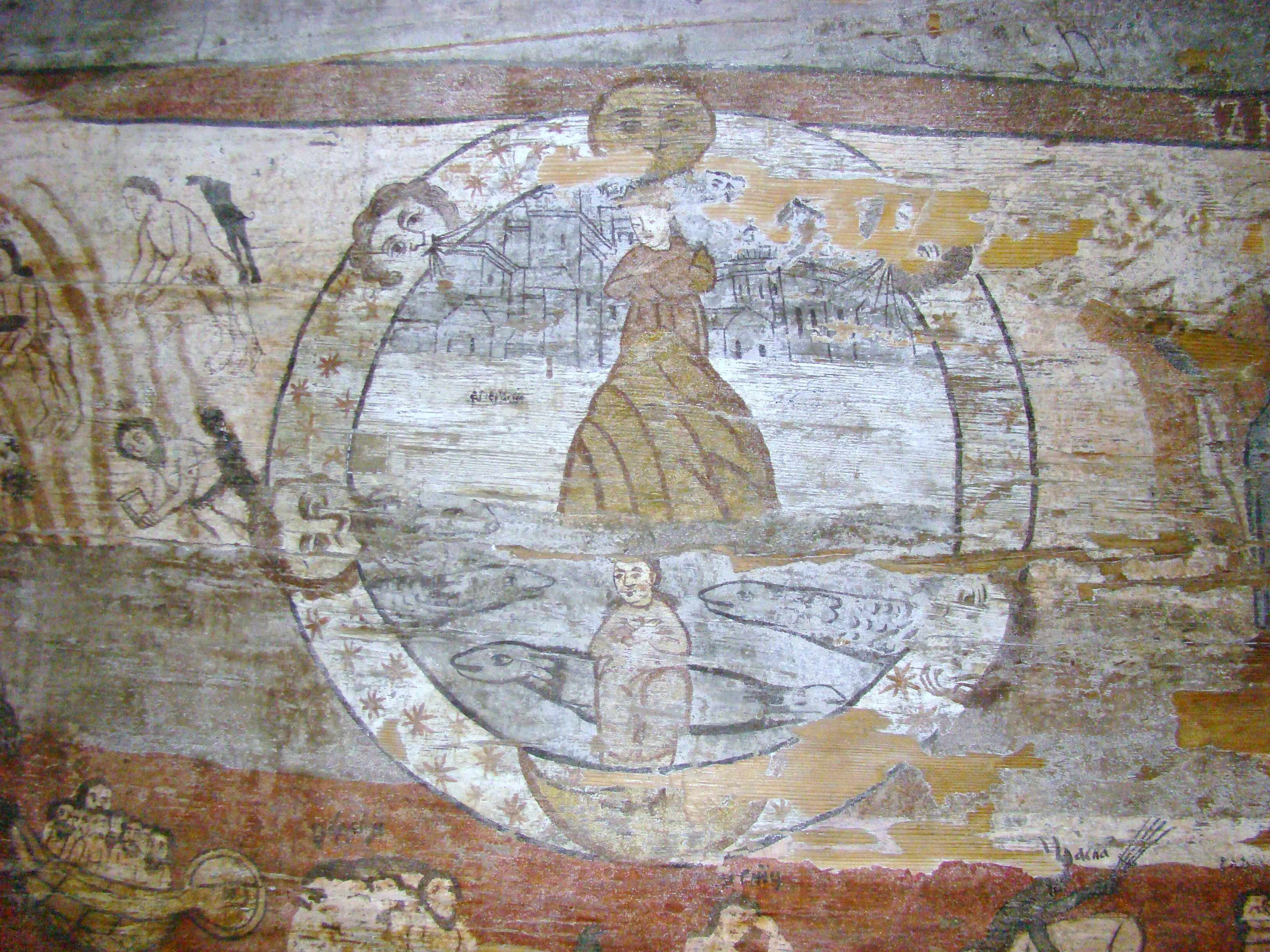 Biserica de lemn "Sfântul Nicolae", sat BOGDAN VODĂ